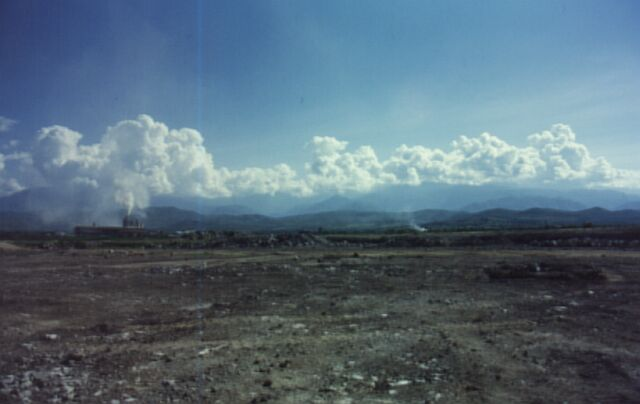 Kalkabbau bei Hima, SW Uganda /Limequarry at Hima, SWE Uganda